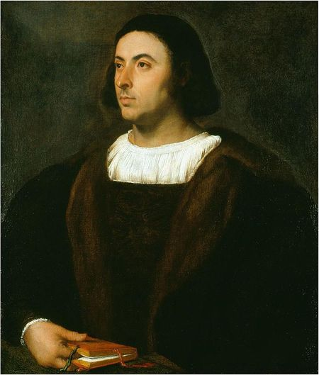 Gemälde: Der italienische Dichter Jacopo Sannazaro (1456/58-1530)